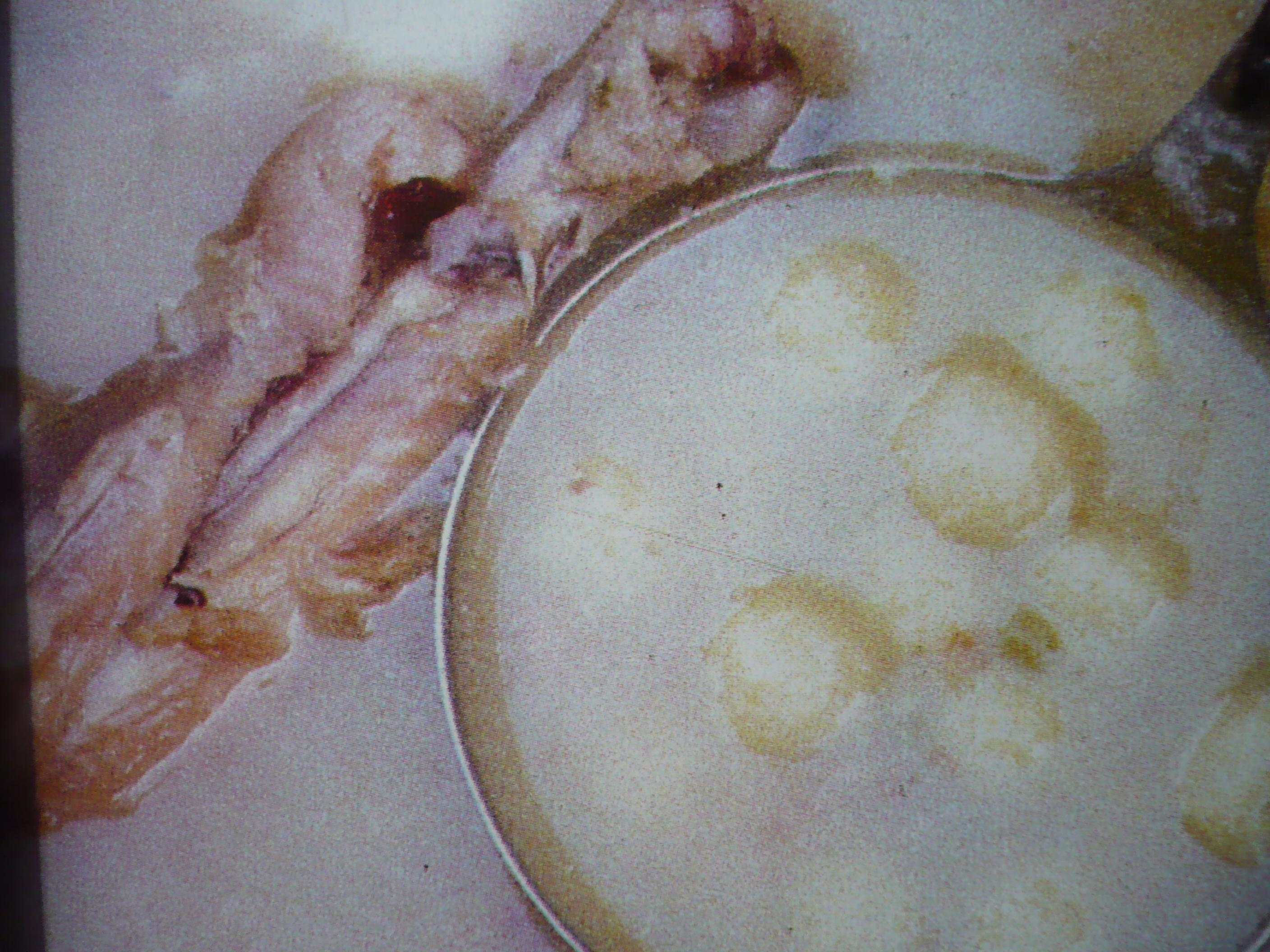 Vorí vorí